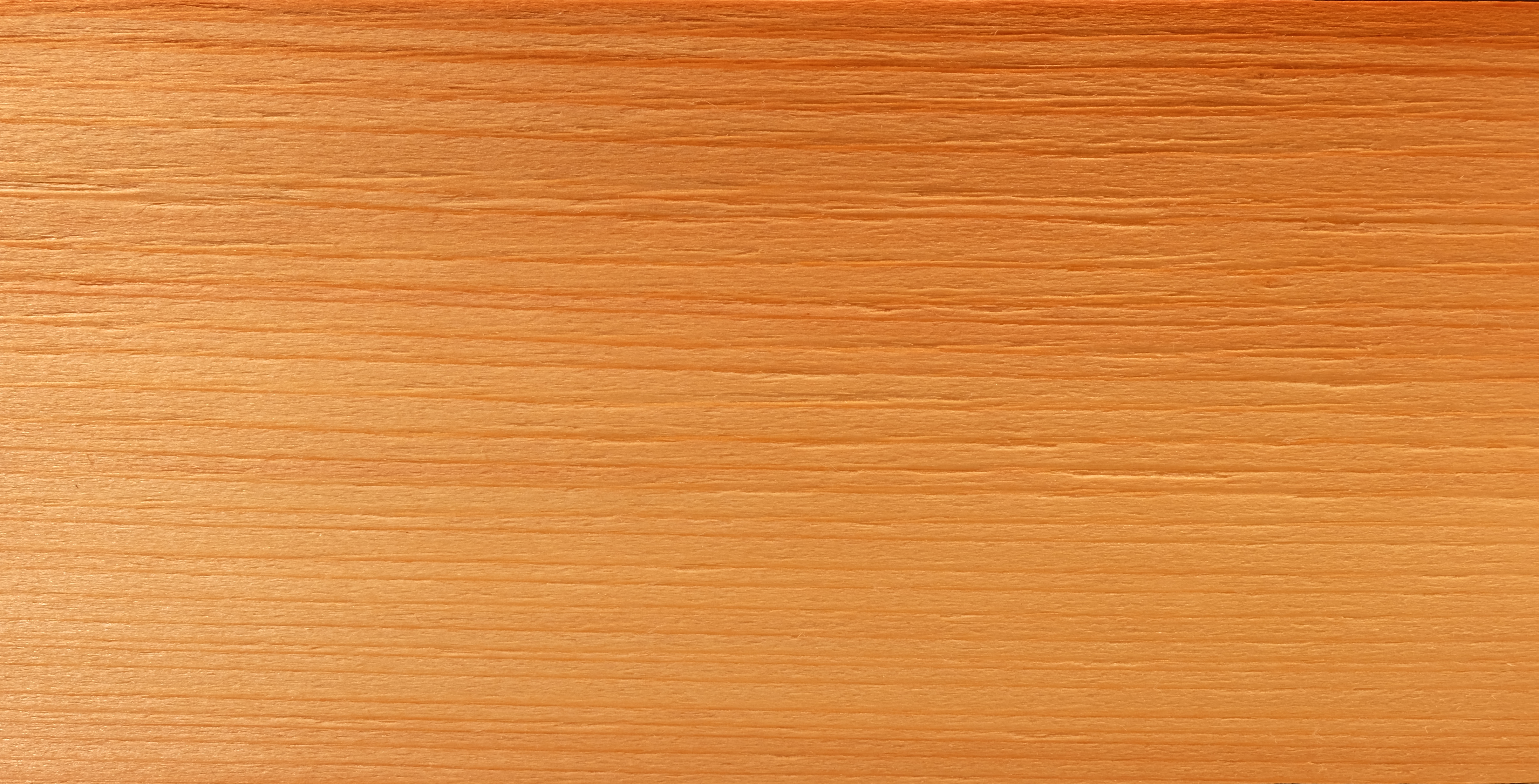 gemessertes Furnier; Holzart: Amerikanische Zypresse, Arizona-Zypresse